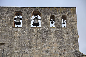 Azueloko monastegiko kanpaiak. Monastegia eliza zen garaian kanpairik txikiena erlojua zen, 1968.urteko berritze lanetan kendu zena.